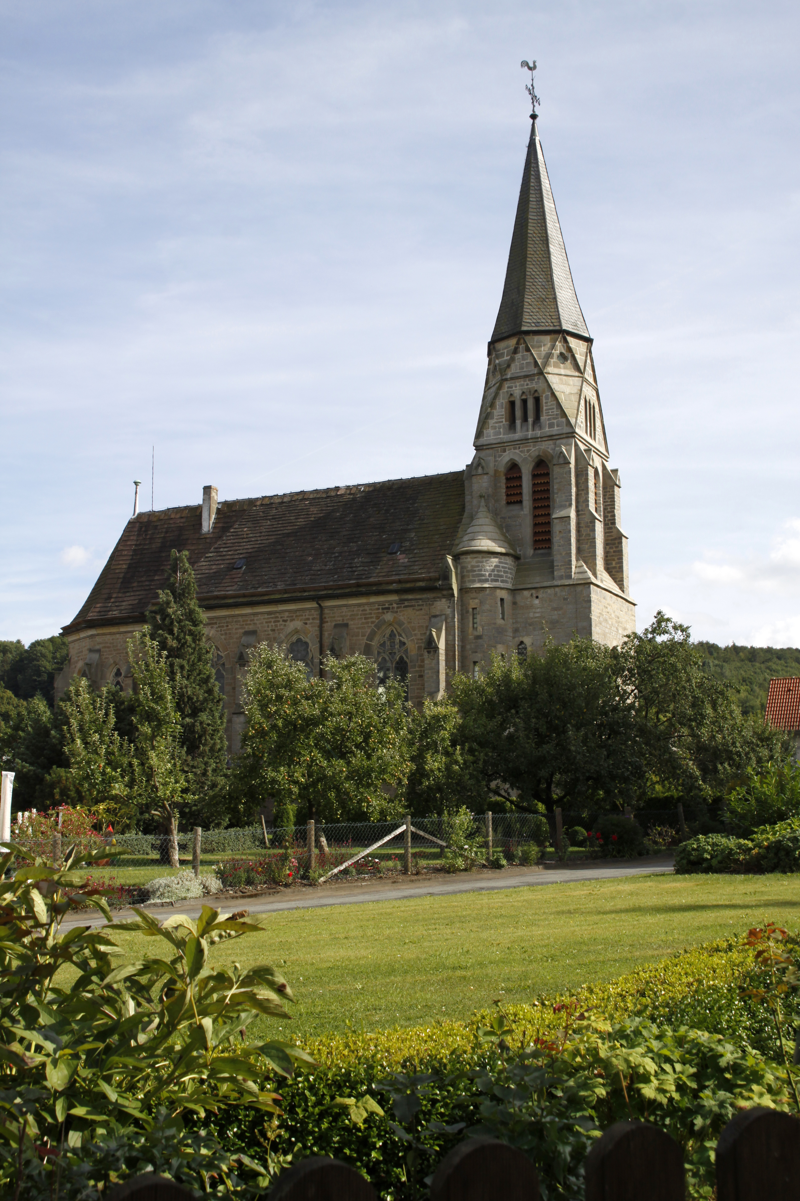 This is a photograph of an architectural monument.It is on the list of cultural monuments of NieheimDie evangelische Kreuzkirche in Nieheim